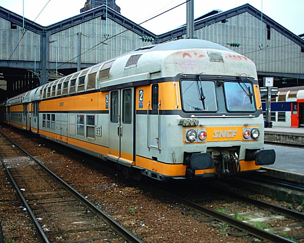 Voiture de banlieue à deux niveaux #95 à Paris Saint Lazare en 2005.